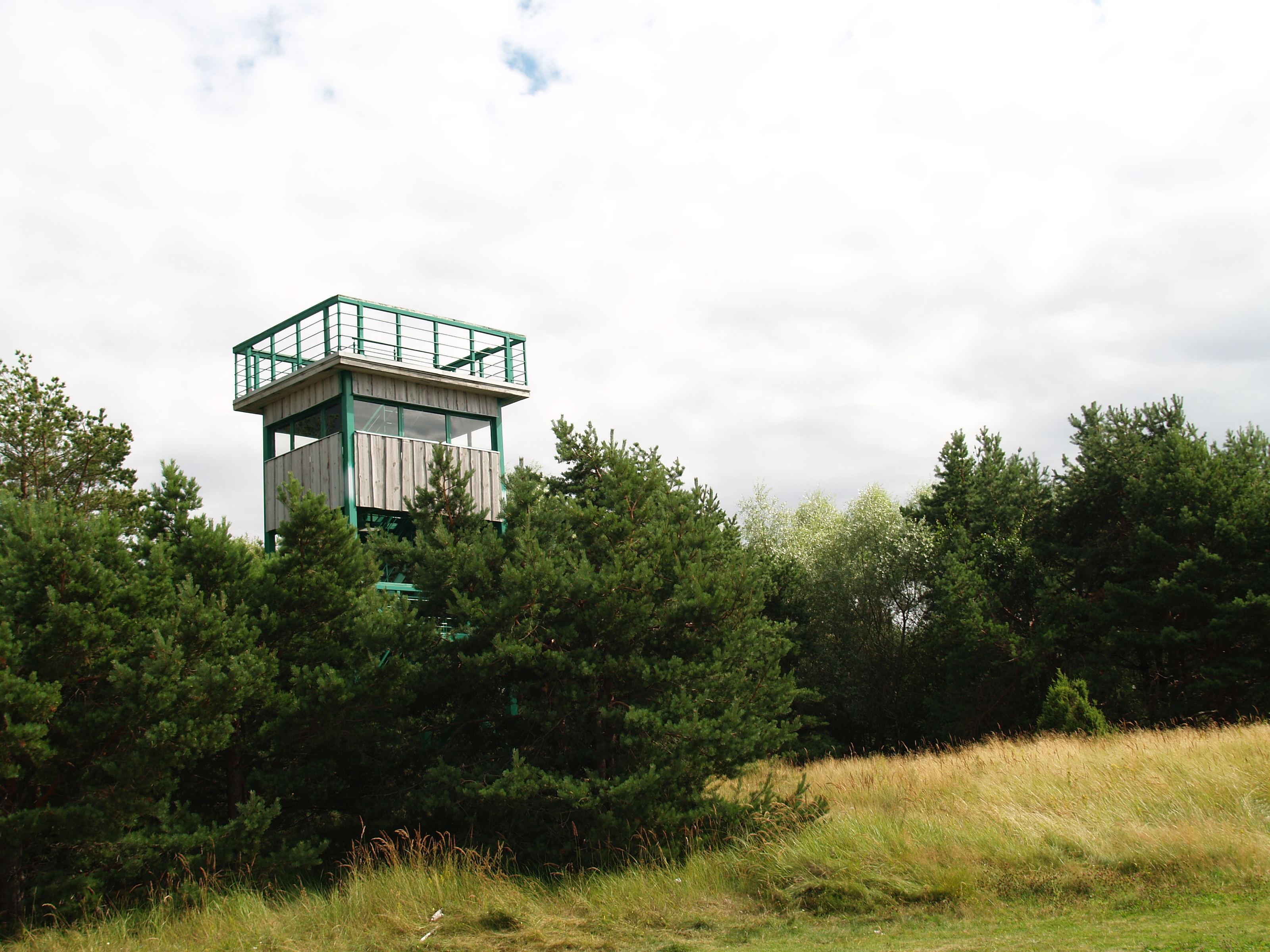 Kabli linnuvaatlustorn.